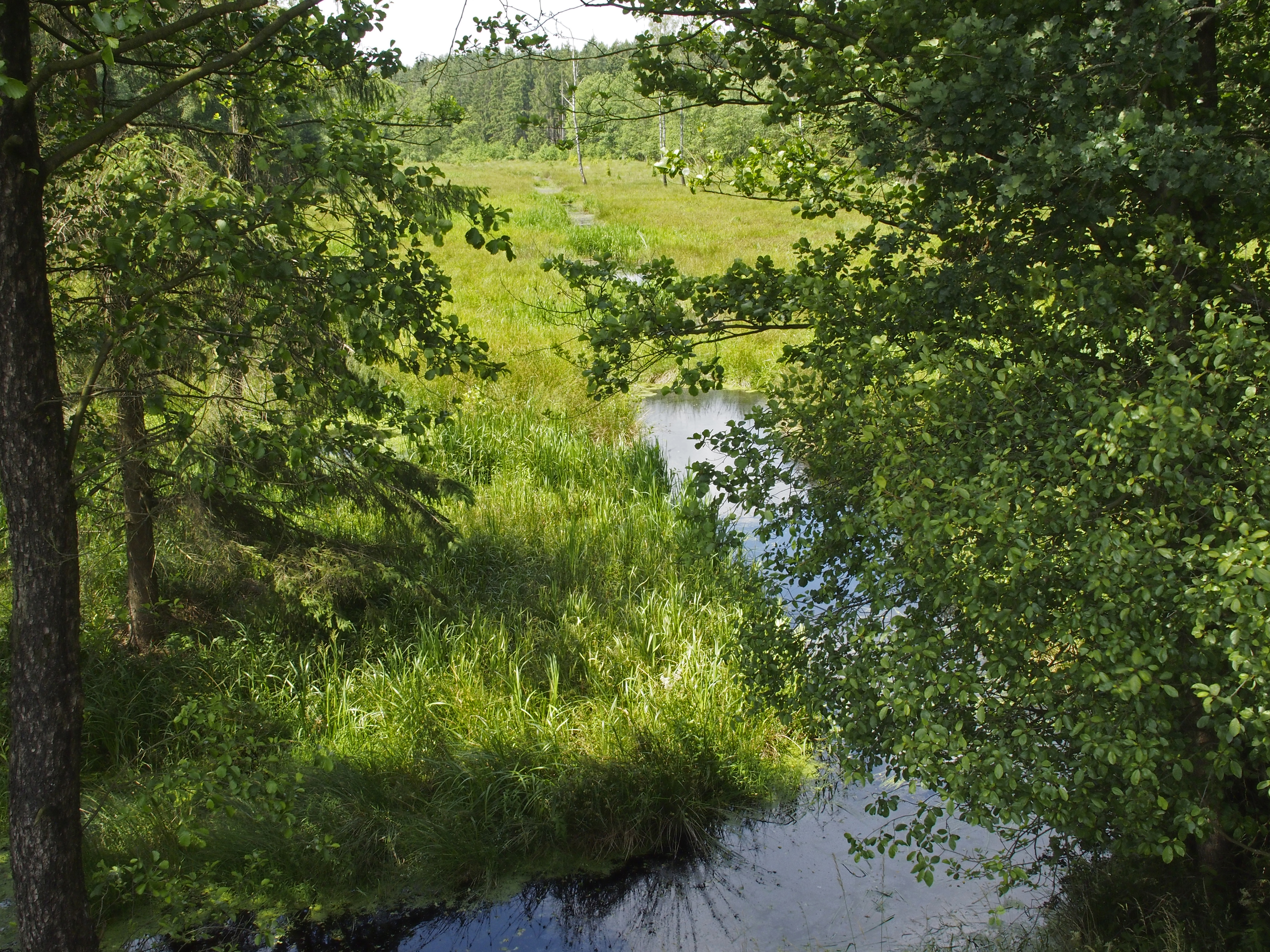 Quellgebiet der Lutter (Lachte) bei Eschede-Weyhausen (Germany)